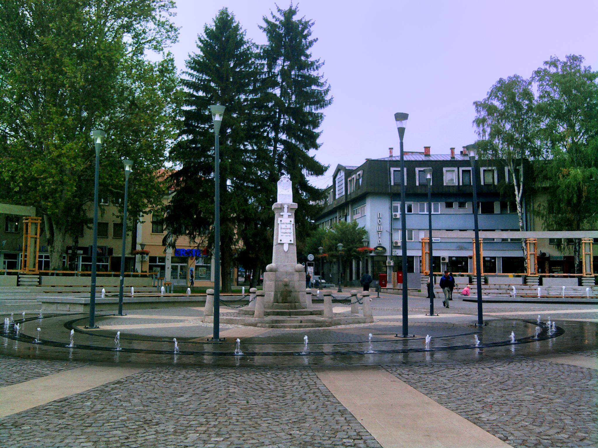 Spomen česma na gradskom trgu u Požegi